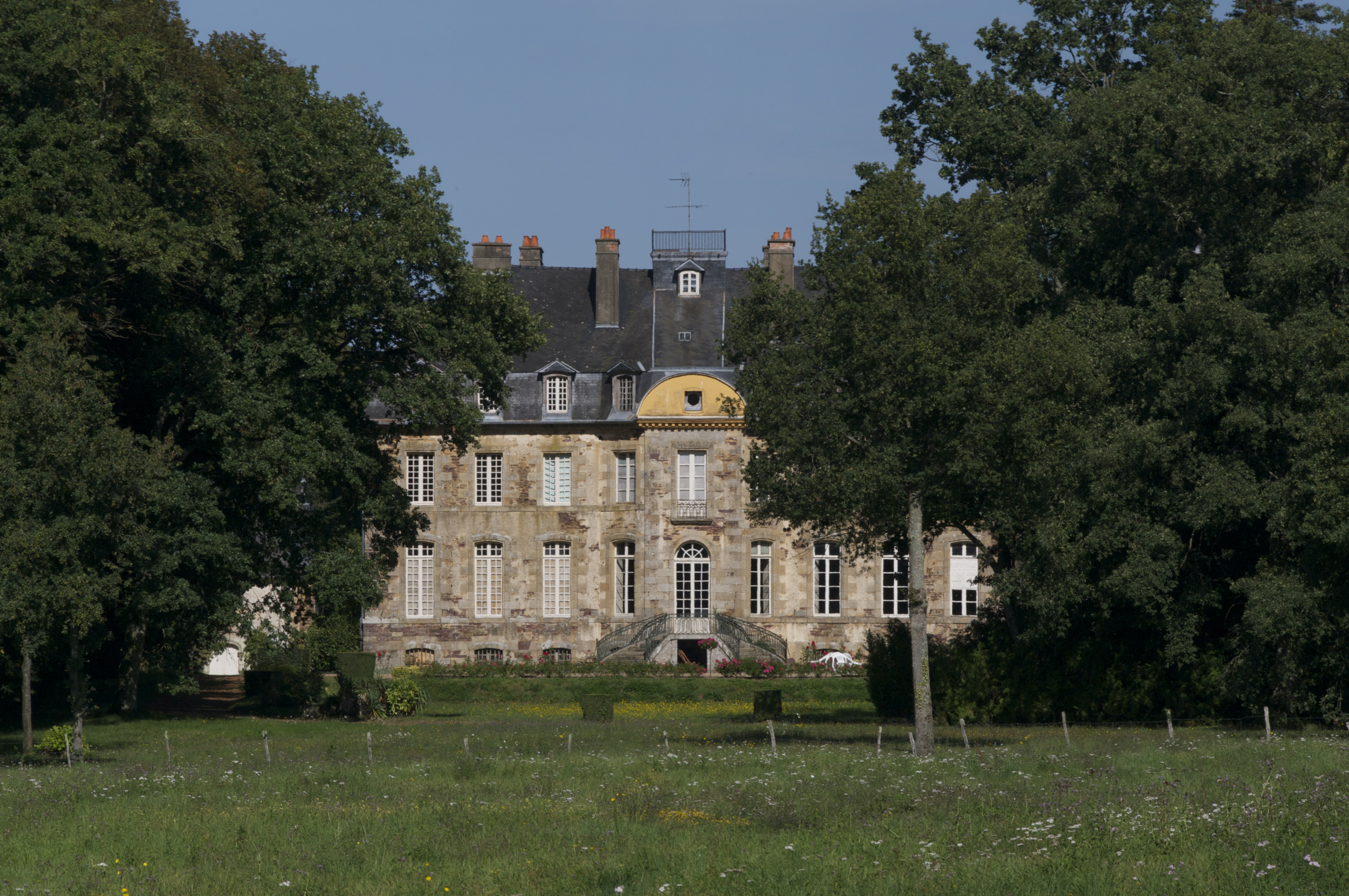 Le Château du Molant est situé dans le département français d'Ille-et-Vilaine, sur la commune de Bréal-sous-Montfort. .